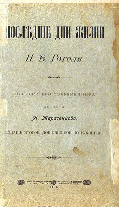 Обложка книги А. Т. Тарасенкова "Последние дни жизни Н. В. Гоголя"